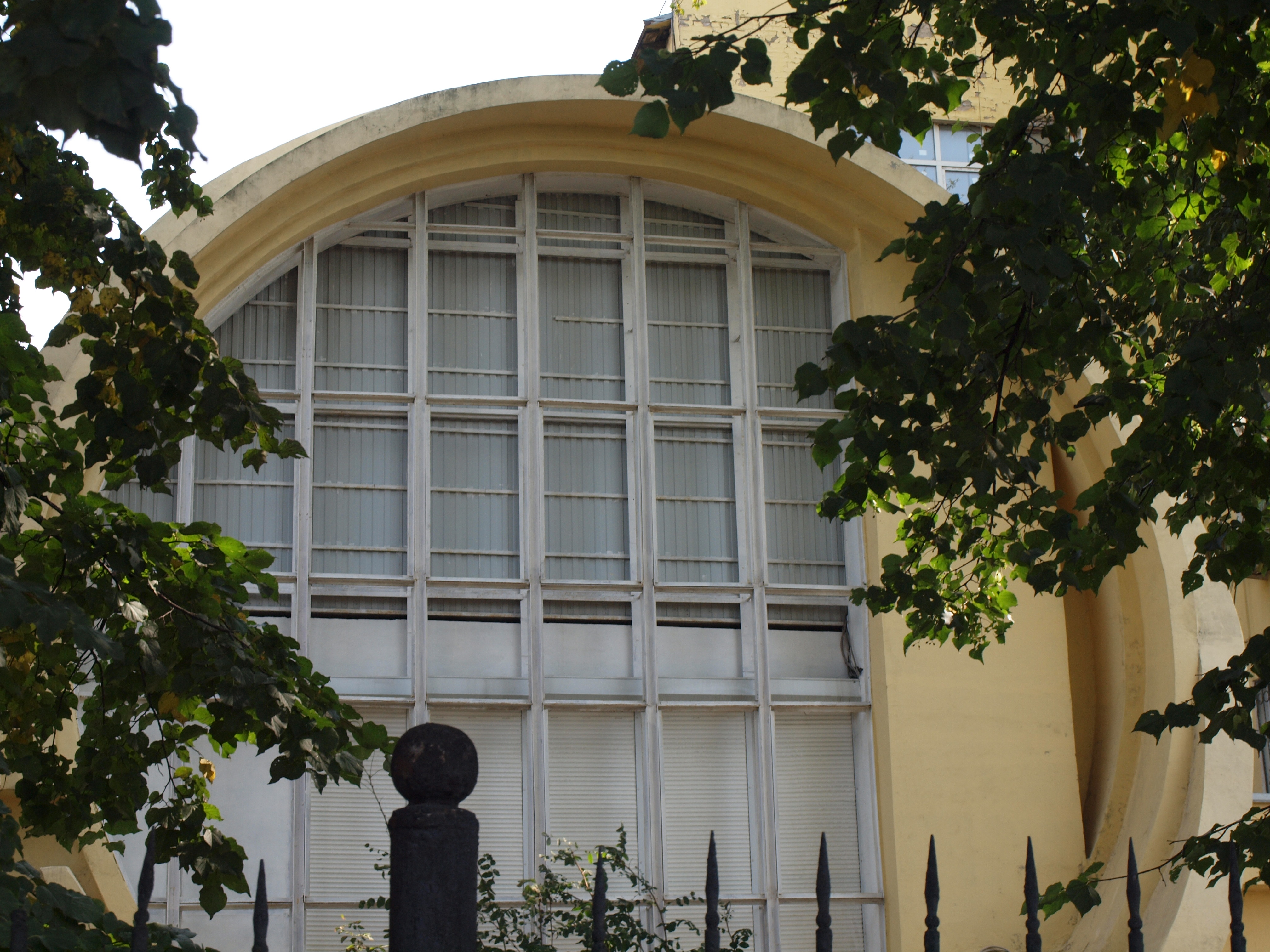 Гараж для Госплана: Авиамоторная ул., дом 63, строение 1, Лефортово, Юго-Восточный округ, Москва